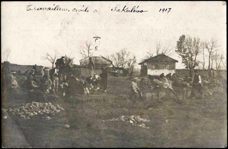 Църква в Сакулево.